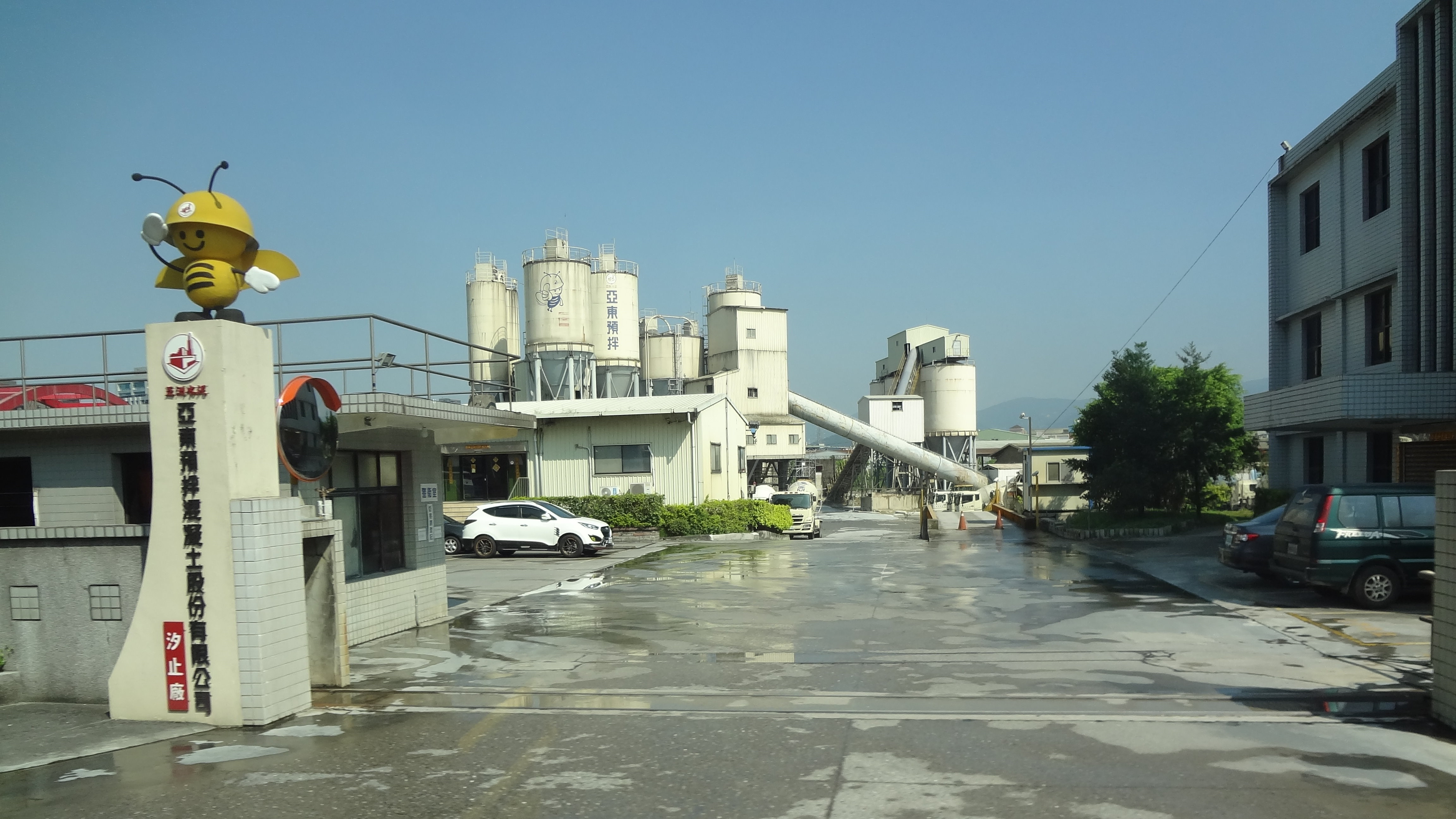 亞東預拌混凝土汐止廠，位於新北市汐止區大同路一段139號。本照片係從公車上拍攝。